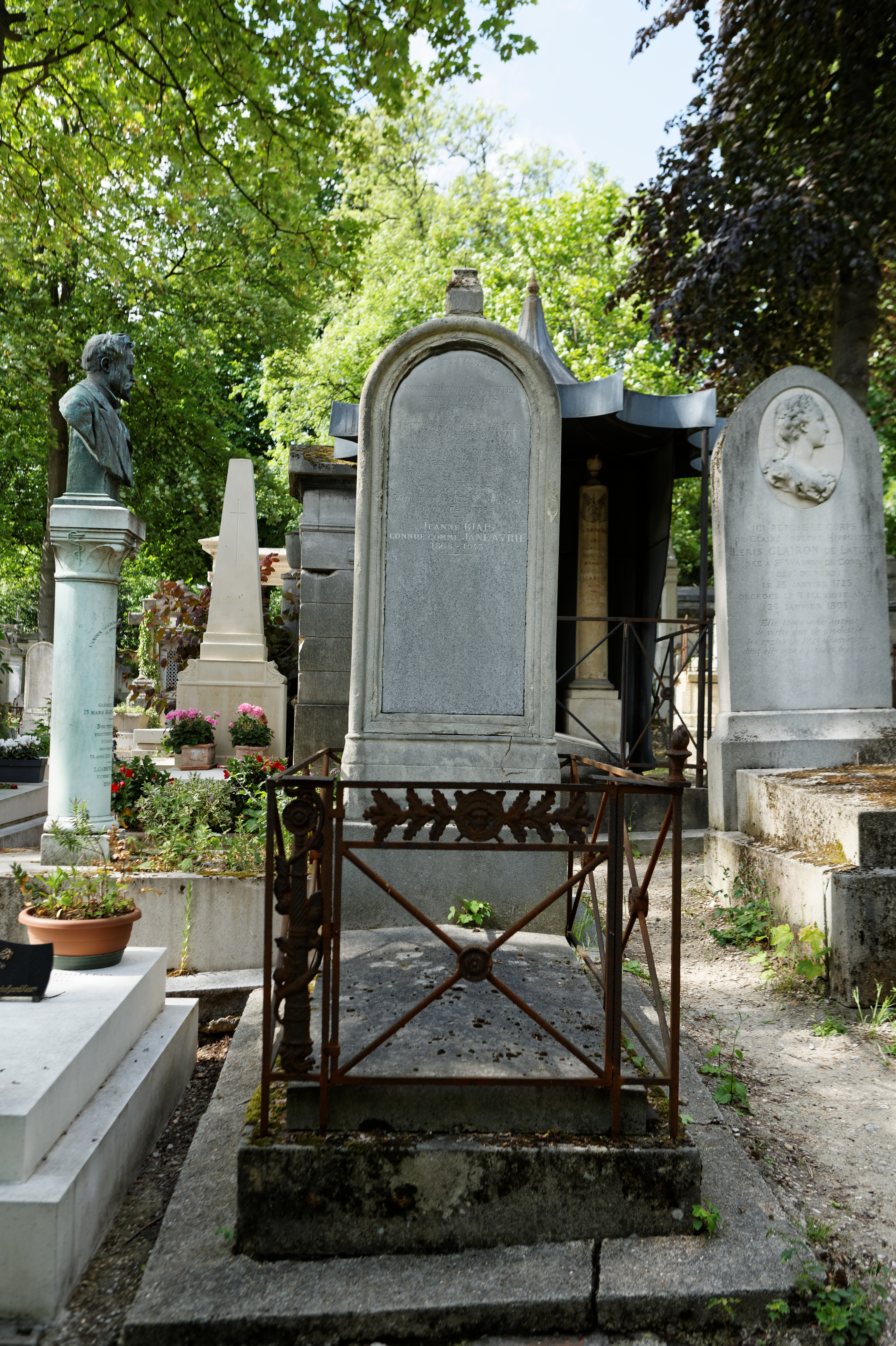 Sépulture d'Adolphe Cazalis (1804-1894), père du médecin et poète Henri Cazalis ; Jane Avril (1868-1943), une des danseuses les plus célèbres du Moulin Rouge ; Maurice Biais (1872-1926), peintre, dessinateur, affichiste et époux de Jane Avril.